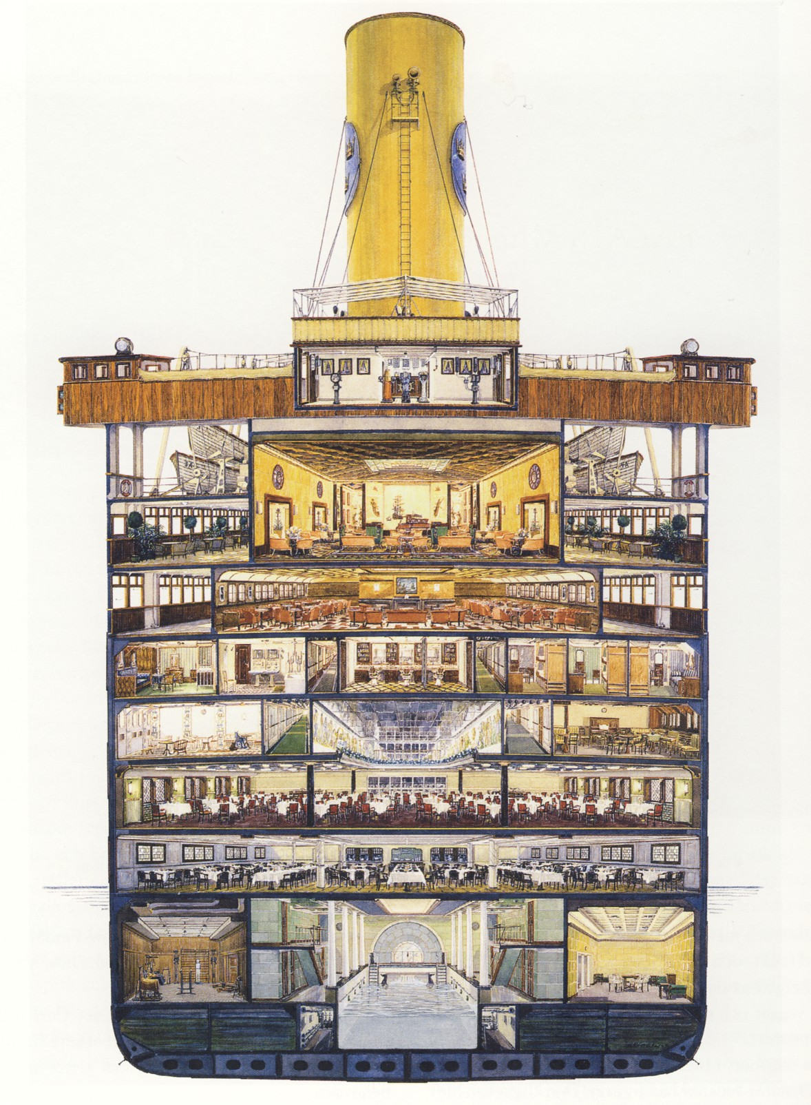 M/S Kungsholm 1928, inredningsritning av Carl Bergsten 1927